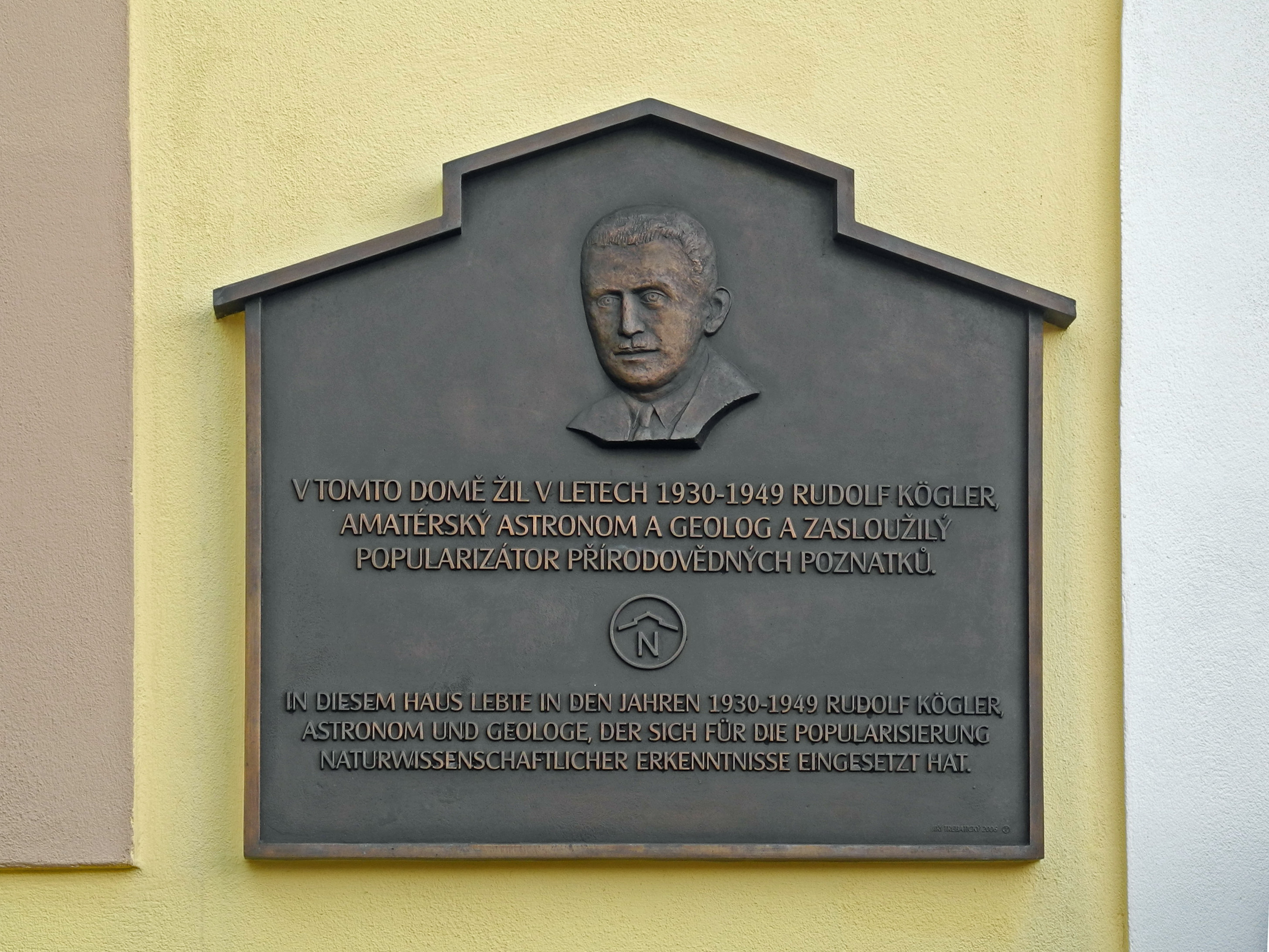 Tafel am Kögler-Haus in Gärten (Zahrady, OT von Krásná Lípa)